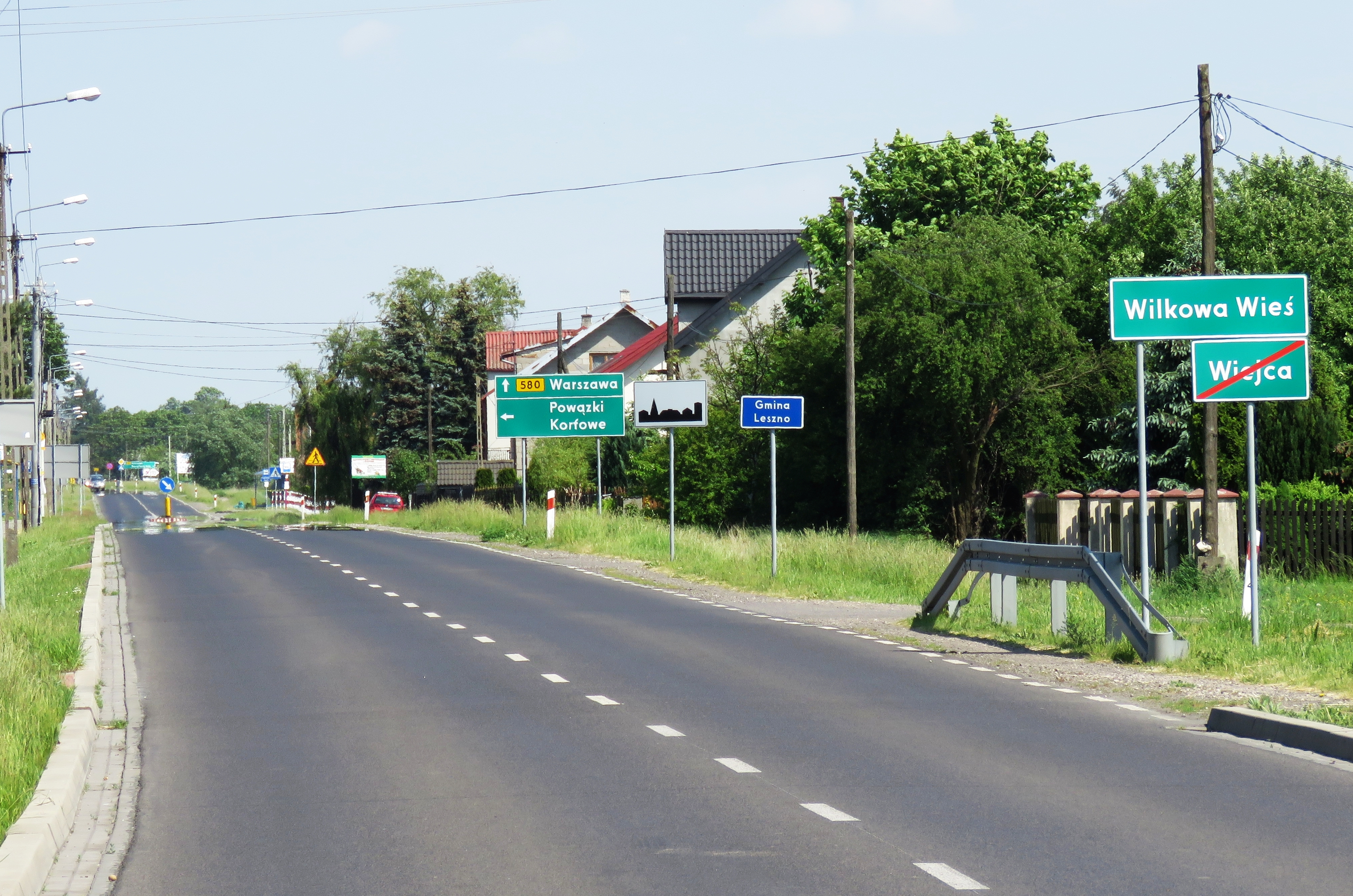 Wilkowa Wieś, gmina Leszno